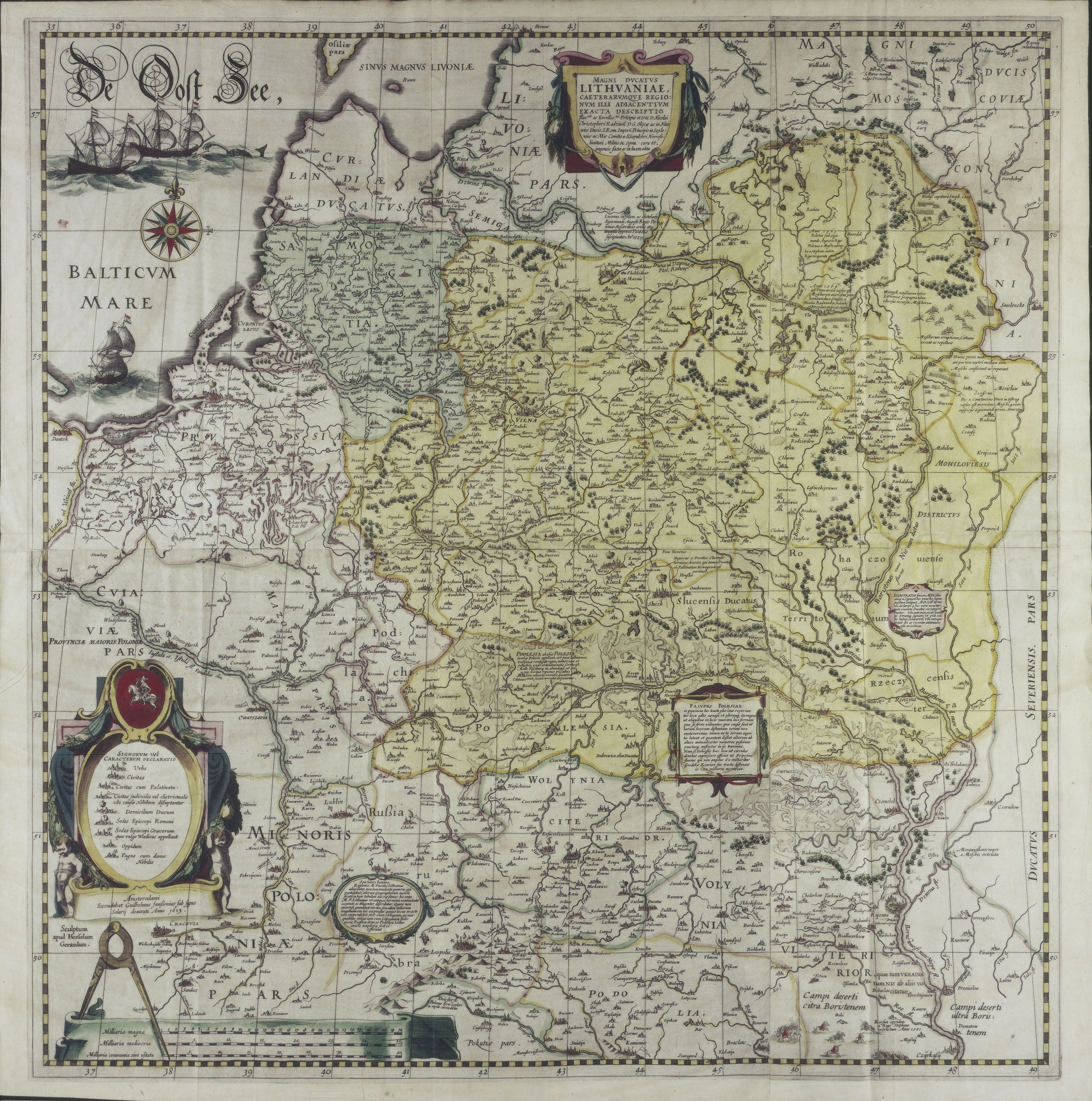 Беларуская (тарашкевіца): Вялікае Княства Літоўскае (Vialikaje Kniastva Litoŭskaje). Мапа